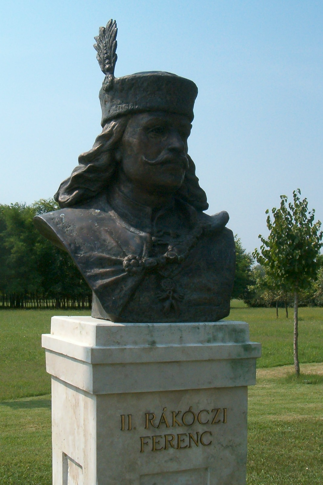 II. Rákóczi Ferenc fejedelem. Jószay Zsolt (*1951) alkotása Nemzeti Történeti Emlékpark / National Historical Memorial Park in Ópusztaszer, Hungary self shot photo (2005), Váradi Zsolt